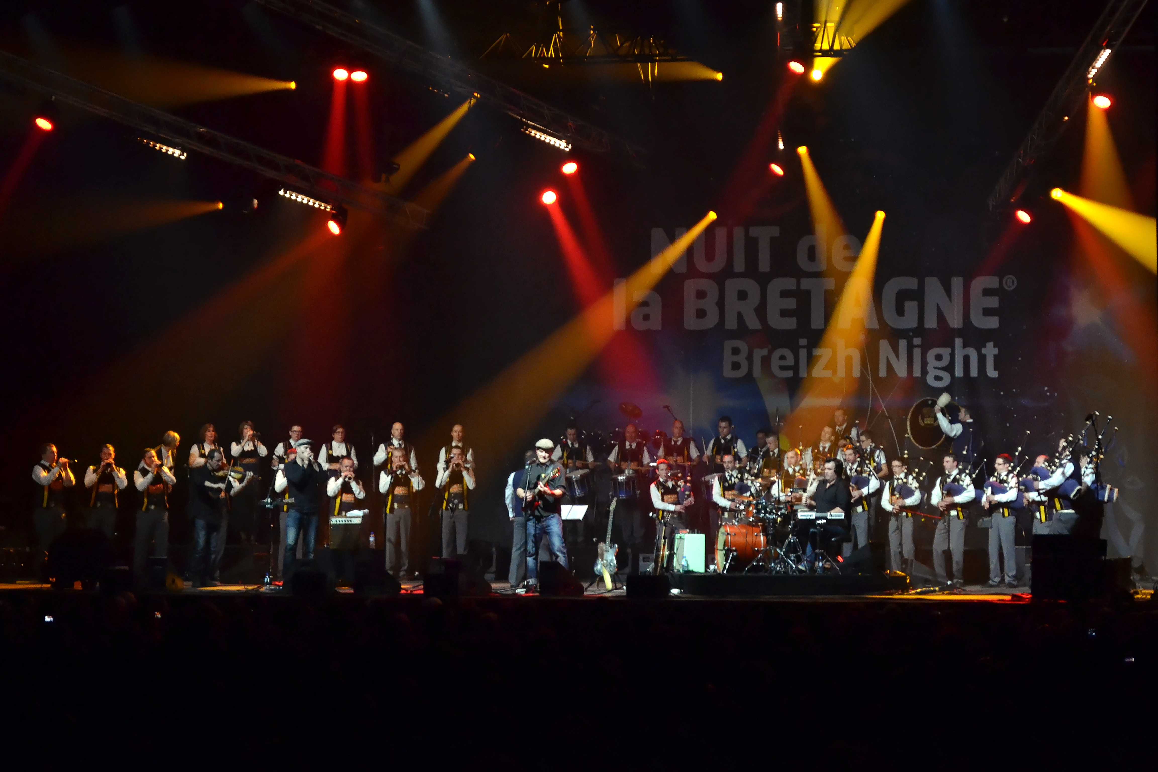 Fest-Rock en concert pour la Nuit de la Bretagne au parc de Langolvas le 11 janvier 2014.